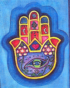 Hamsa mano usada en la religion musulmana y judia